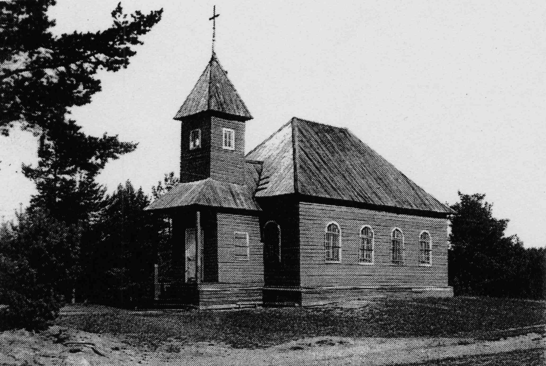 Немецко-финско-эстонский молитвенный дом прихода Каприо в селе Ручьи.